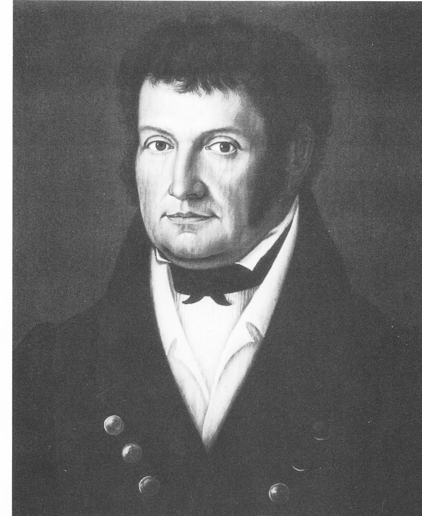 Porträt des Hüttenwerksbesitzers Philipp Anton Fauler